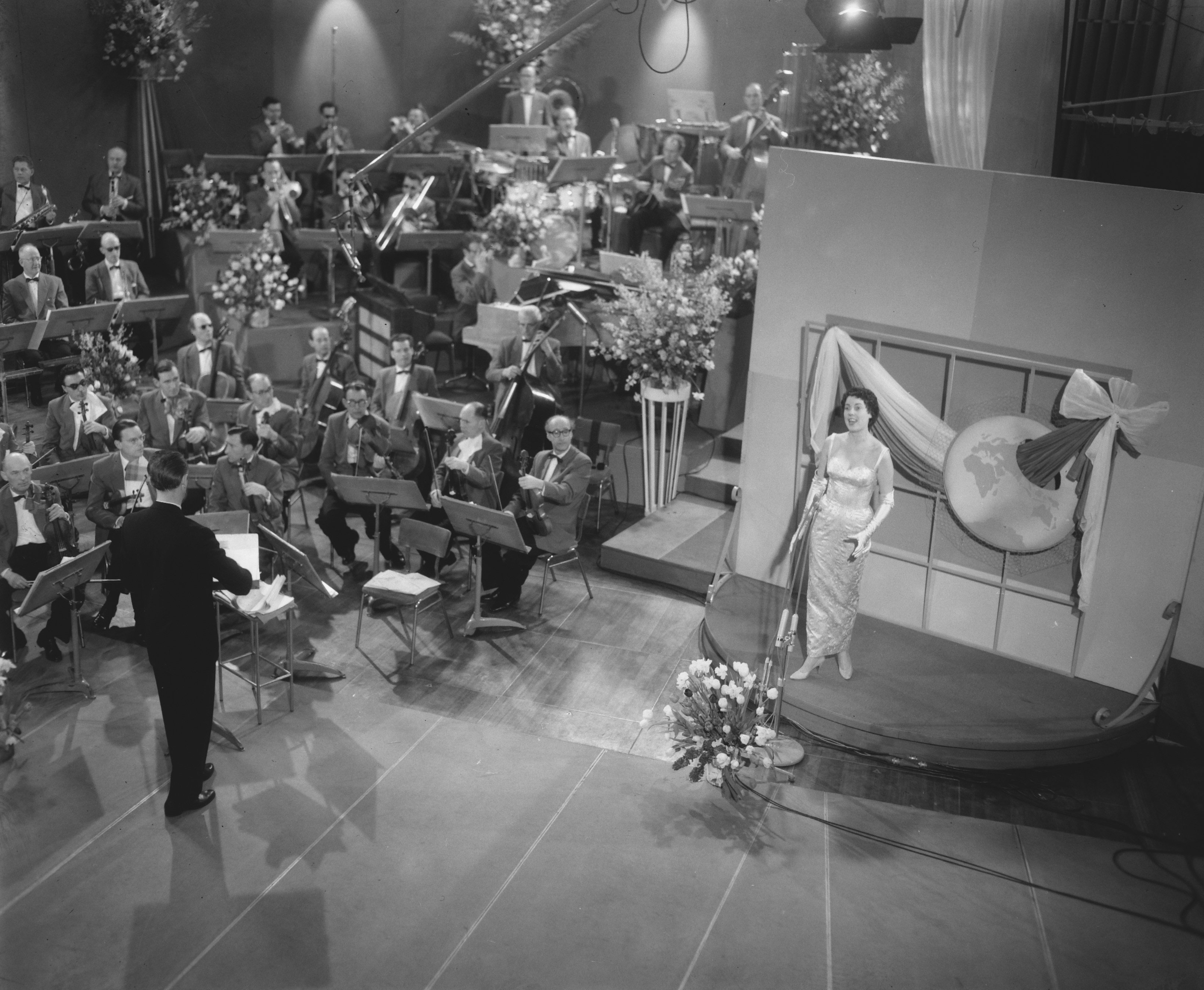 Collectie / Archief : Fotocollectie Anefo Reportage / Serie : Songfestival 1958 Beschrijving : Corry Brokken (Nederland) tijdens uitzending Datum : 11 maart 1958 Locatie : Hilversum, Noord-Holland Trefwoorden : songfestivals, zangeressen Persoonsnaam : Brokken, Corry Fotograaf : Pot, Harry / Anefo Auteursrechthebbende : Nationaal Archief Materiaalsoort : Negatief (zwart/wit) Nummer archiefinventaris : bekijk toegang 2.24.01.04 Bestanddeelnummer : 909-4011